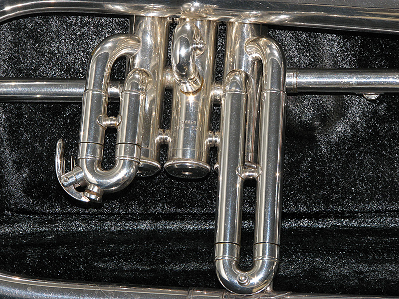 Eigen foto van eigen instrument